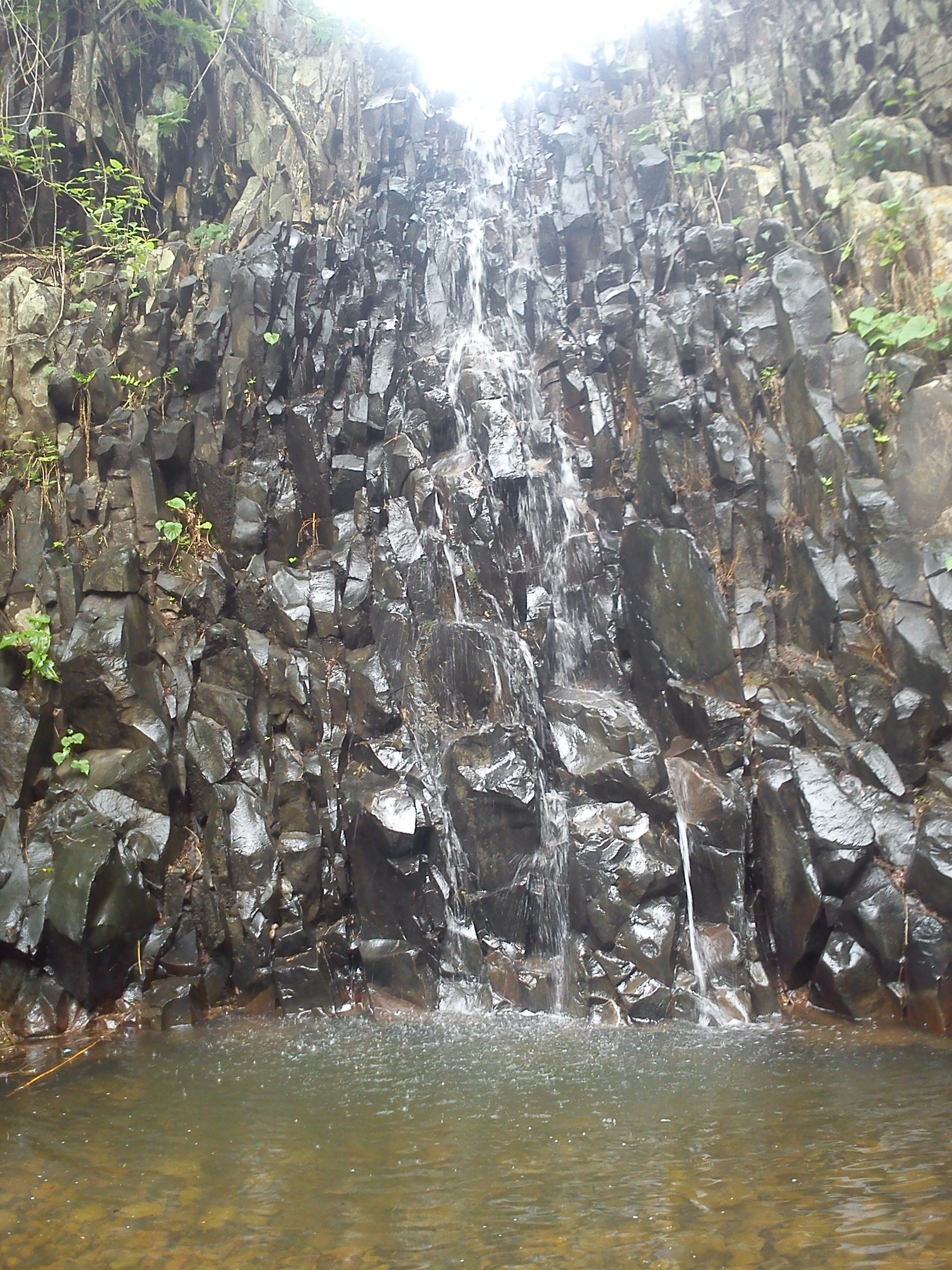 Fotografia de rios naturales en santa cruz de la soledad, Jalisco.